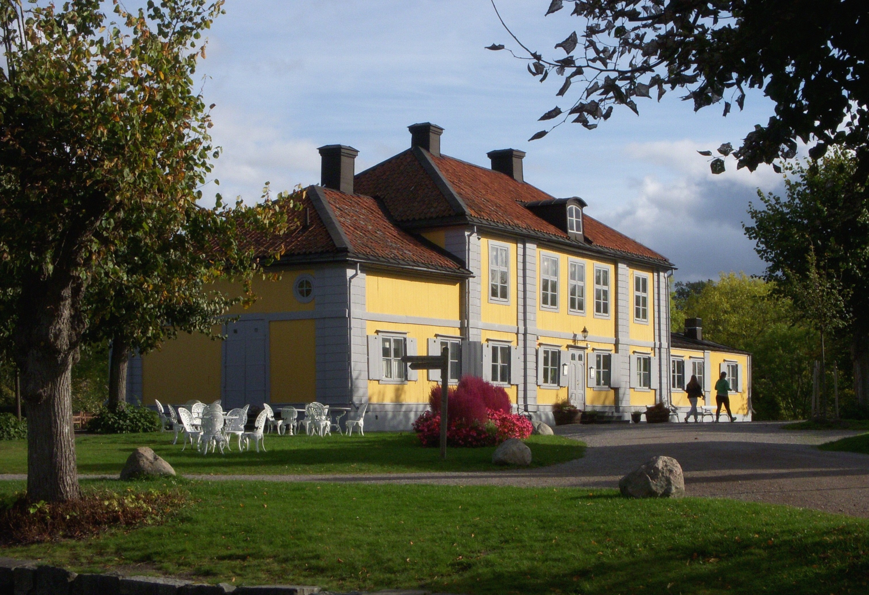 Stora Nyckelviken huvudbyggnad